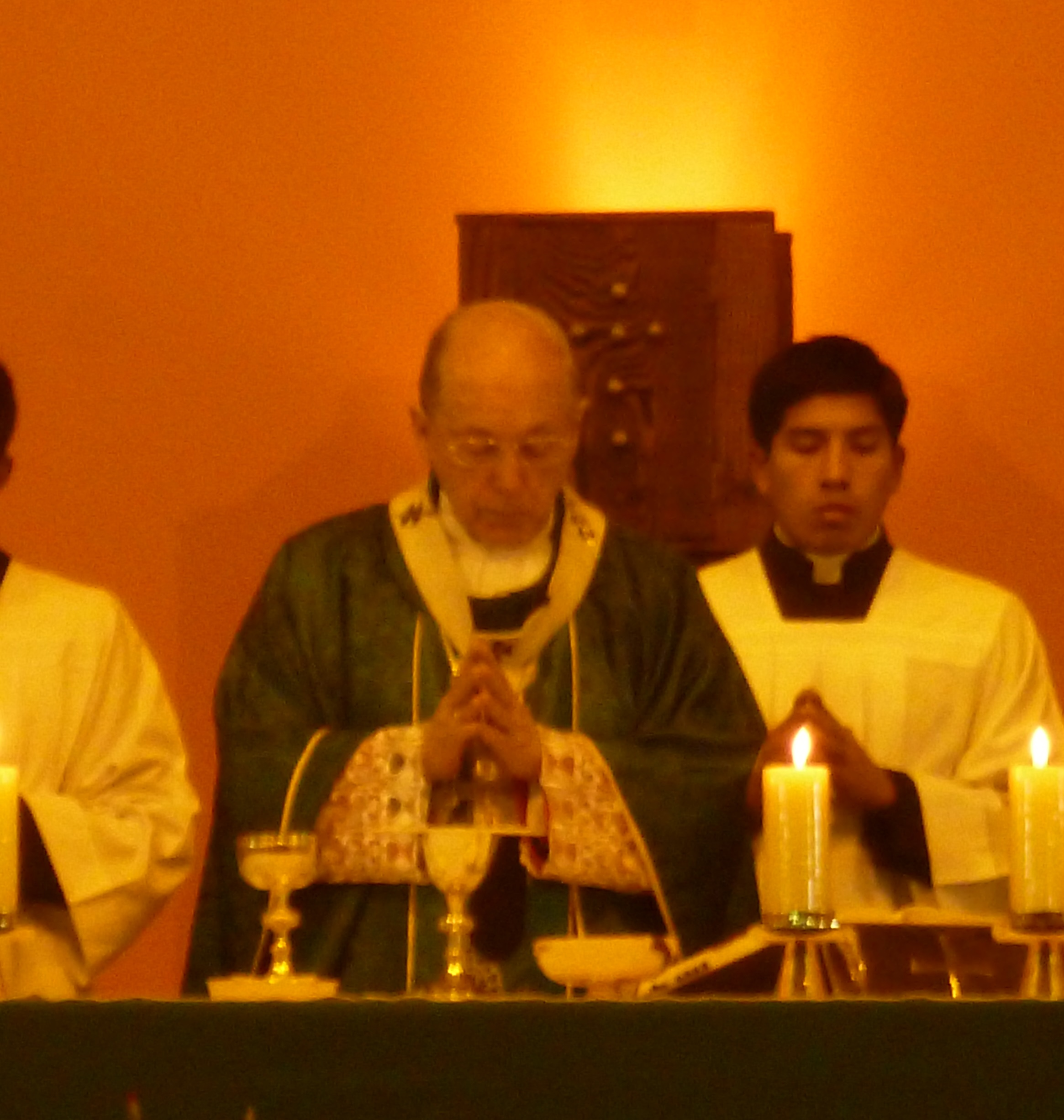 Cardenal Cipriani orando durante una misa en el año 2014